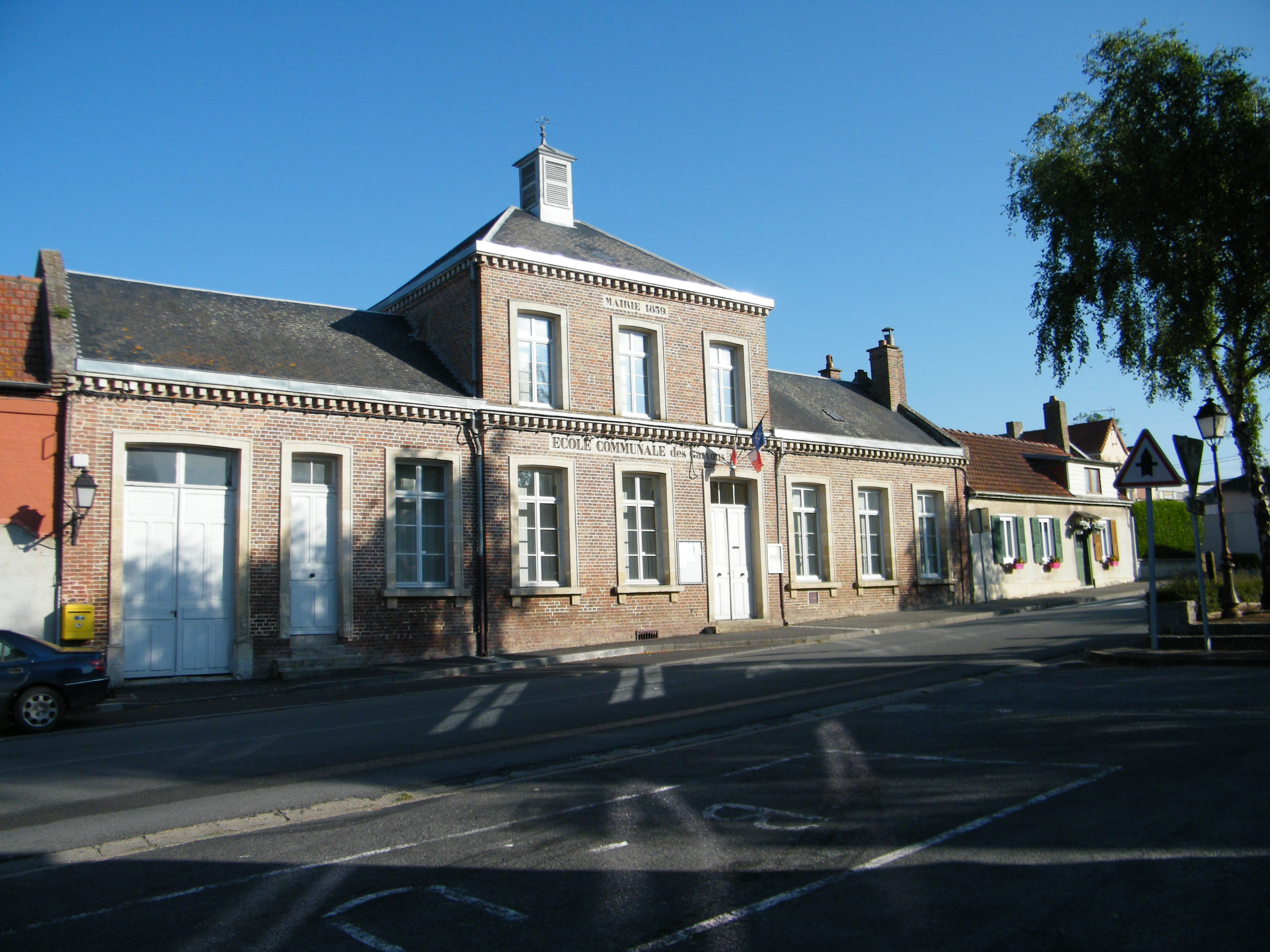 Mairie-école.